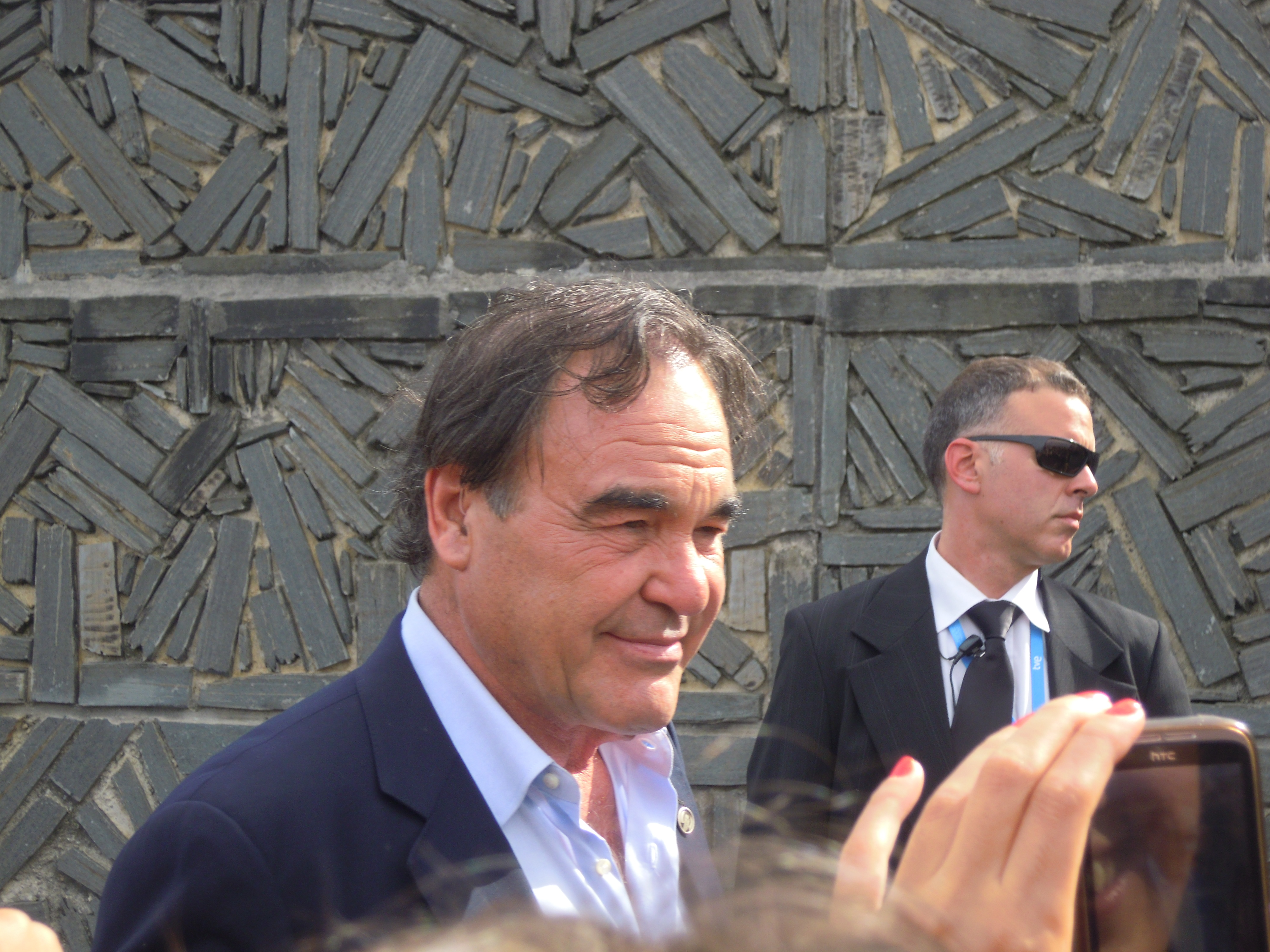 Oliver Stone en la 60 edición del festival de cine de San Sebastián.